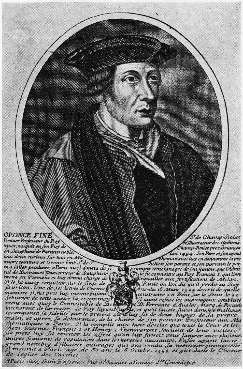 Oronce Fine (1494-1555) französischer Mathematiker und Kartograph.